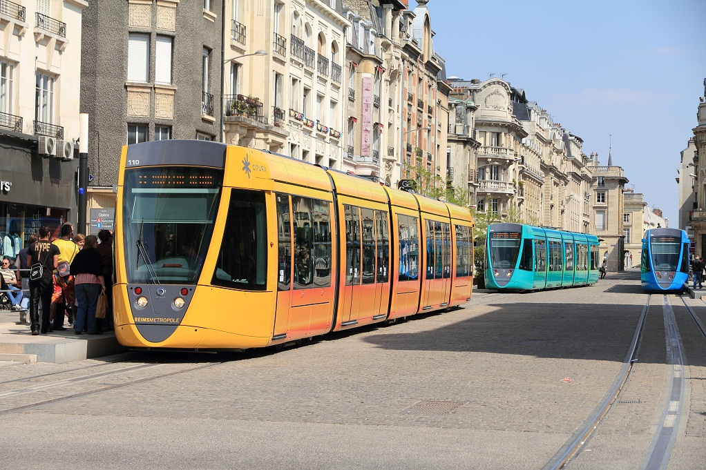 Le tramway de Reims pendant l'inauguration à l'arrêt Opéra, Reims, Marne, France.